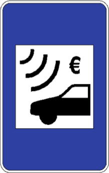 Esta imagem significa sinal das SCUT eletrónica relativo a ser sinal informativo de portagem Eletrónica das SCUT.